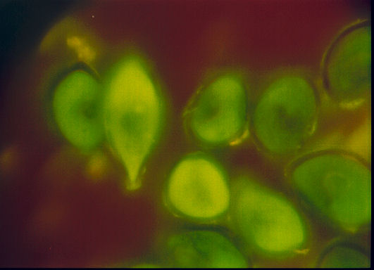 Sporen von Rostpilzen. Puccinia vincae Plowr.Fluoreszenzmikroskopie,Acridinorange-ärbung